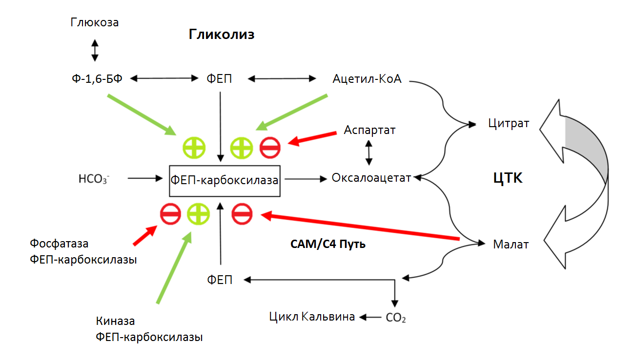 Схема регуляции фермента фосфоенолпируваткабоксилазы.